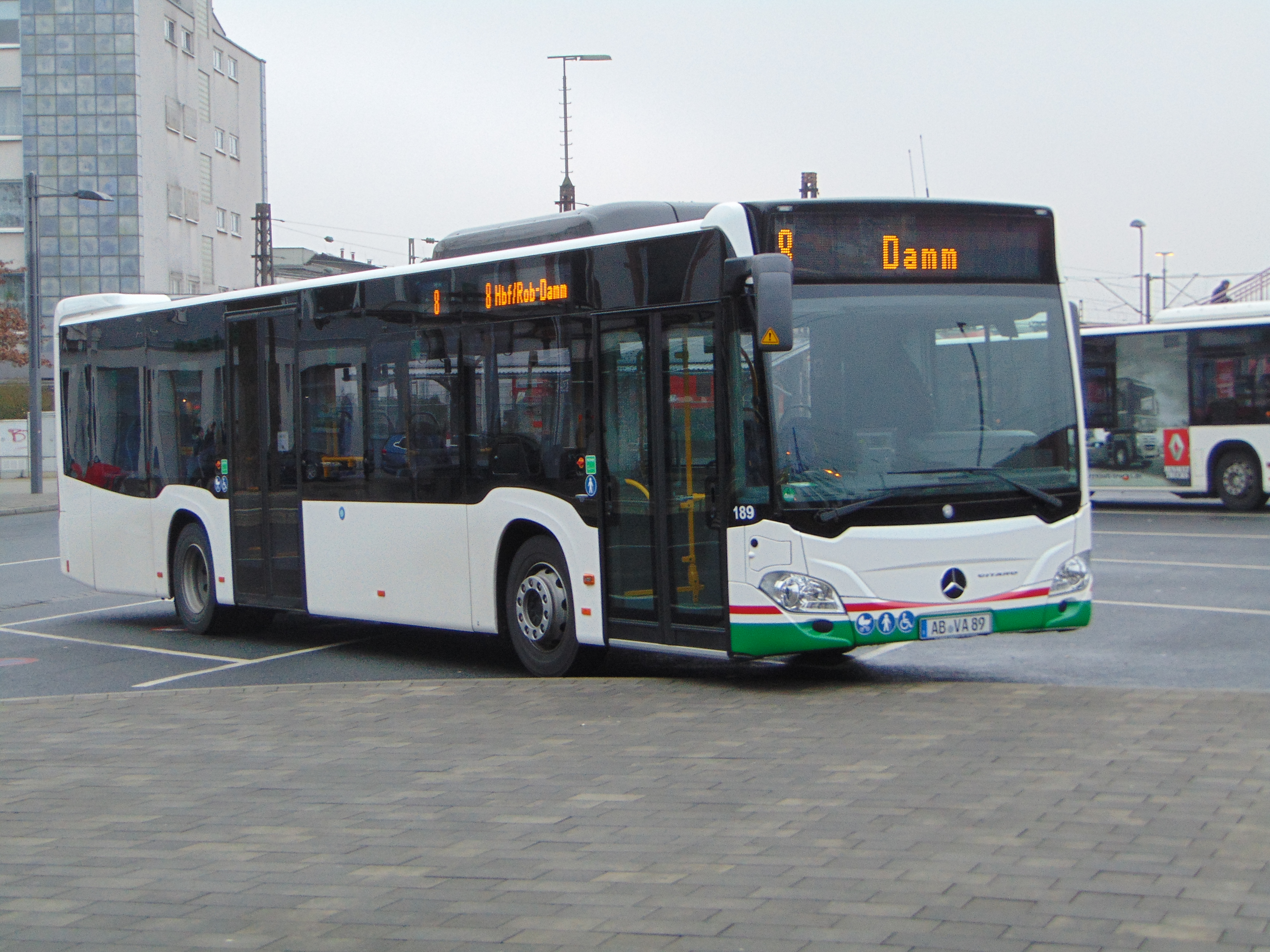 Ein Citaro C2 der Stadtwerke Aschaffenburg am ROB in Aschaffenburg.